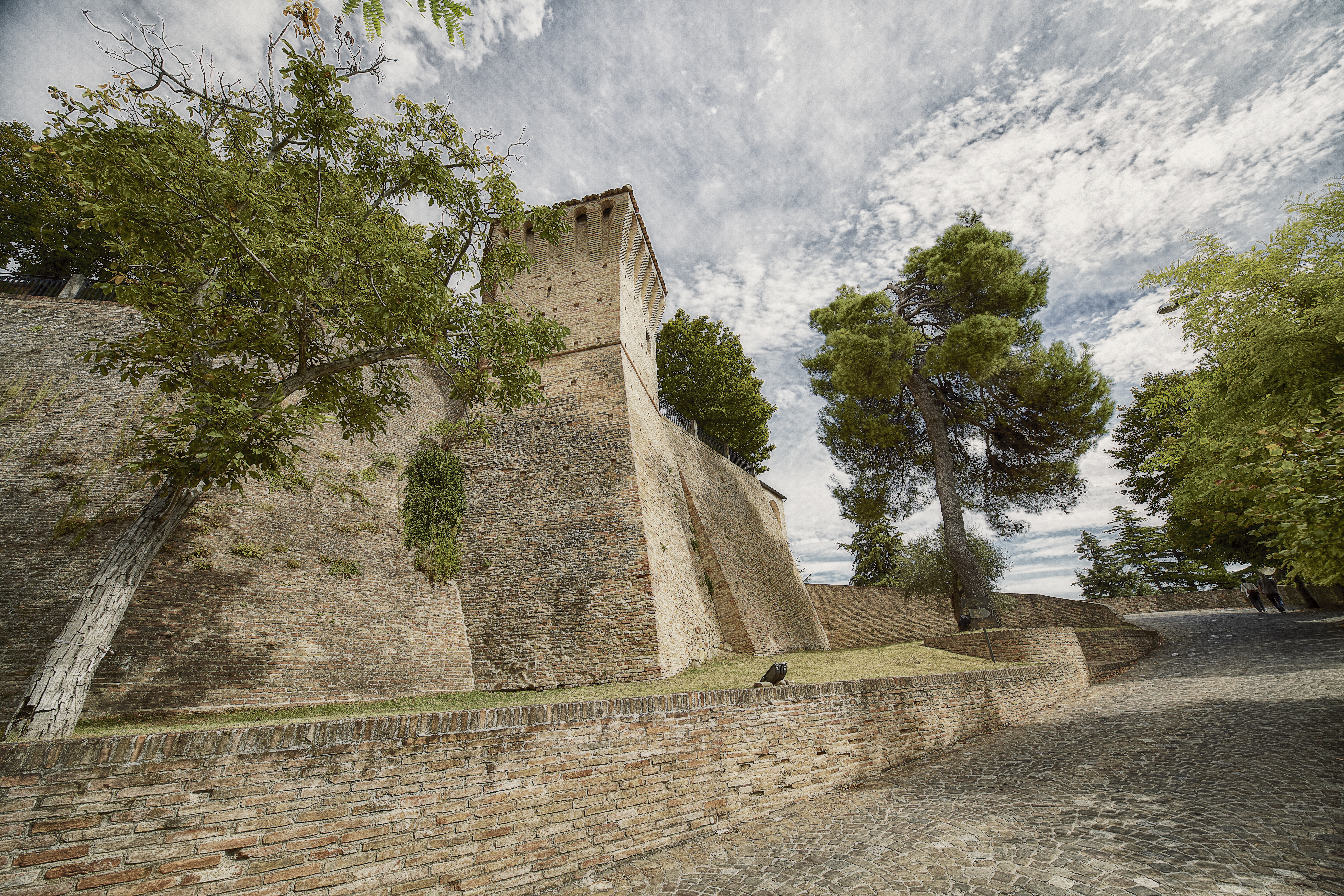 Bastione e mura meridionali This is a photo of a monument which is part of cultural heritage of Italy.